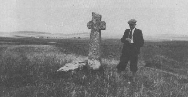 Олександр Цинкаловський біля хреста на місці де ймовірно знаходився Пересопницький монастир Різдва Пресвятої Богородиці.